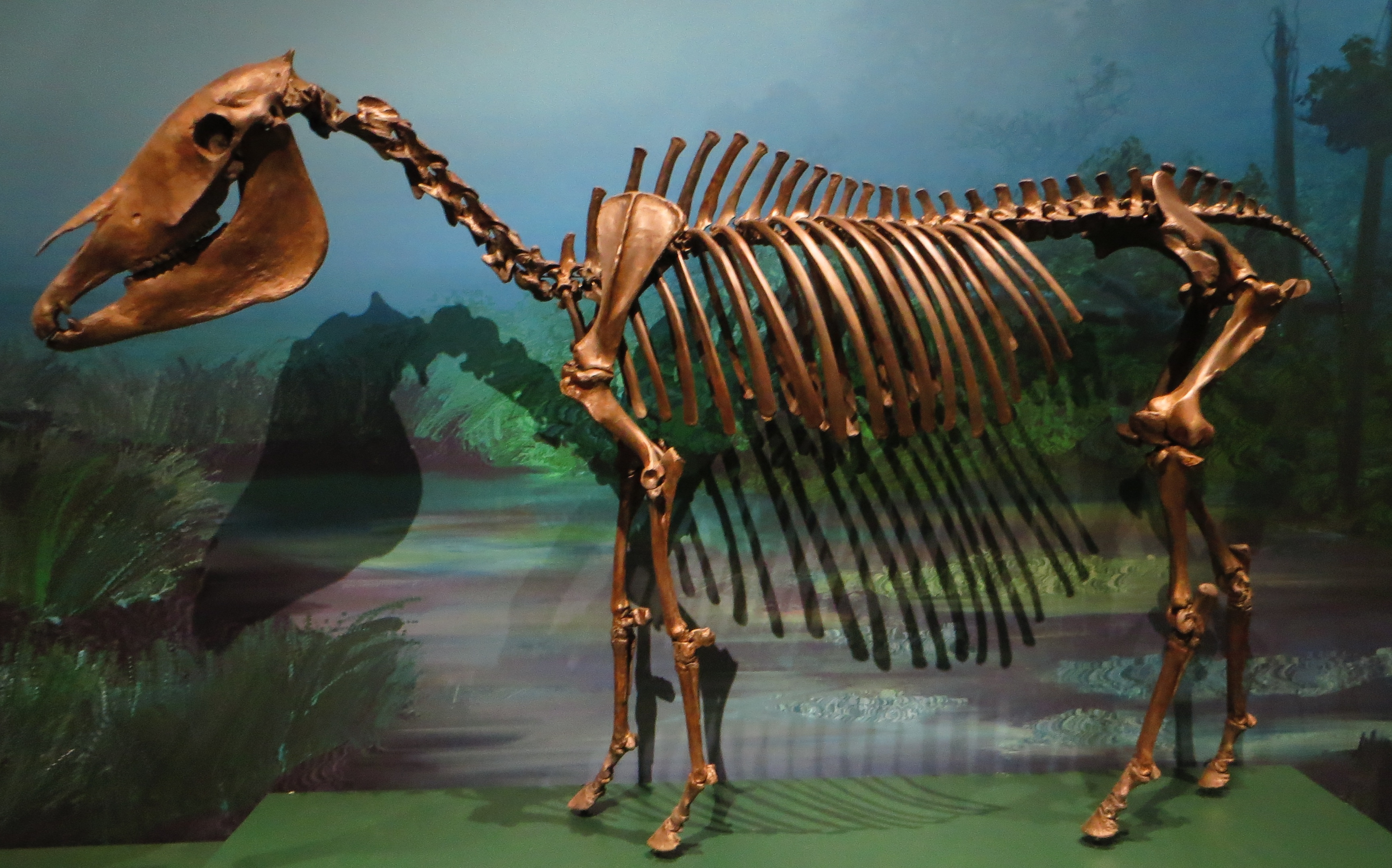 Fossil - Took the picture at Natural History Museum, Karlsruhe